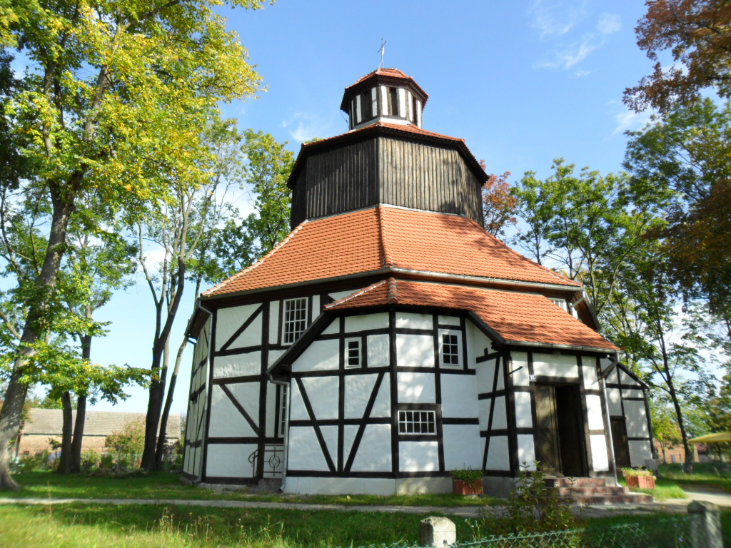 Sękowice - dawny kościół ewangelicki, obecnie rzymskokatolicki p.w. Św. Rodziny, szach., XVIII (zabytek nr 472 z 20.05.1963)